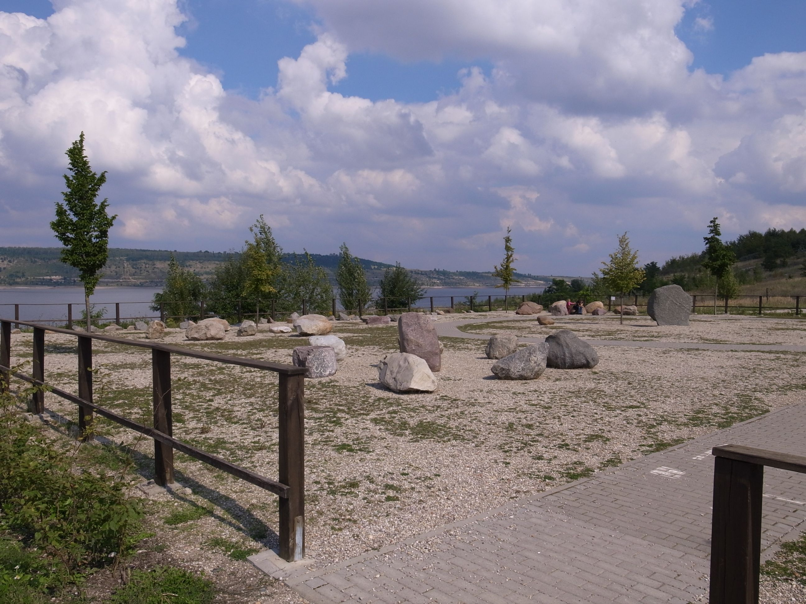 Der Geschiebegarten "Nordisches Plateau" am Geiseltalsee, zusammenstellung von Geschieben aus dem Tagebau Mücheln mit 2 Informationstafen. Quelle